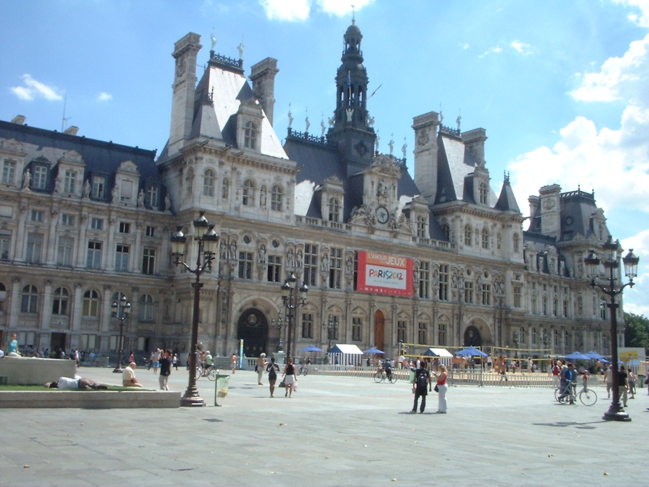 Hotel de Ville Paris Sujet: Hôtel de Ville de Paris pendant l'opération Paris-Plage Date de la prise de vue: août 2004 WP: "(suppr) (actu) 12 aoû 2004 à 10:32 . . Pol (318530 octets) (Photo libre de droits de l'Hôtel de ville de Paris)"